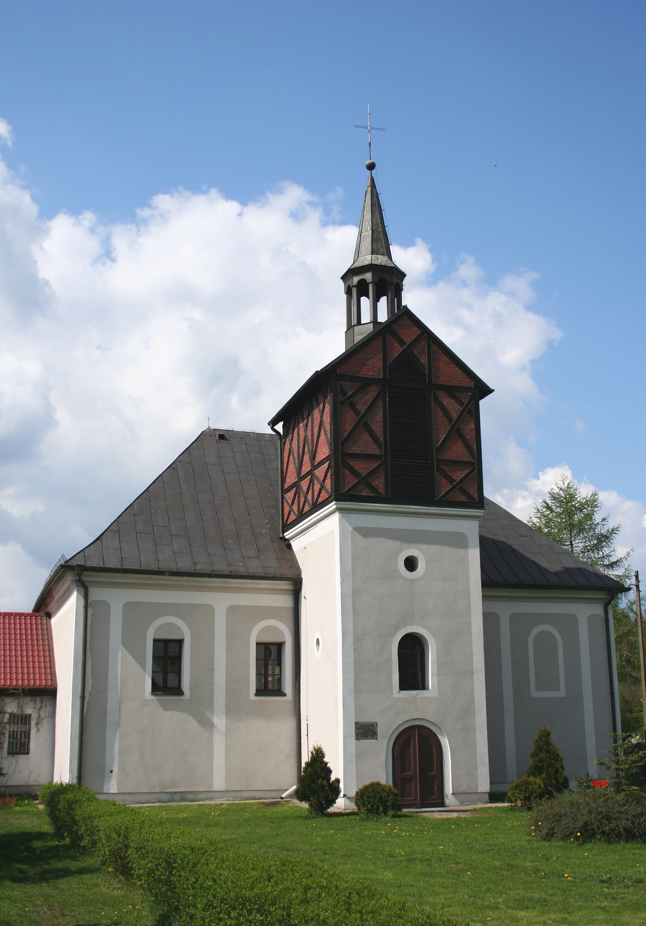 Kościół ewangelicki w Piasku, Polska, województwo śląskie, powiat lubliniecki